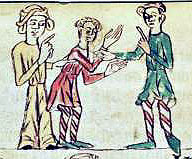 Wenden aus dem Sachsenspiegel (Wolfenbütteler Handschrift). Die Wenden werden durch ihre typische Tracht gekennzeichnet. Eine Frau trägt die typischen gewickelte Kopftücher mit Schläfenringen.